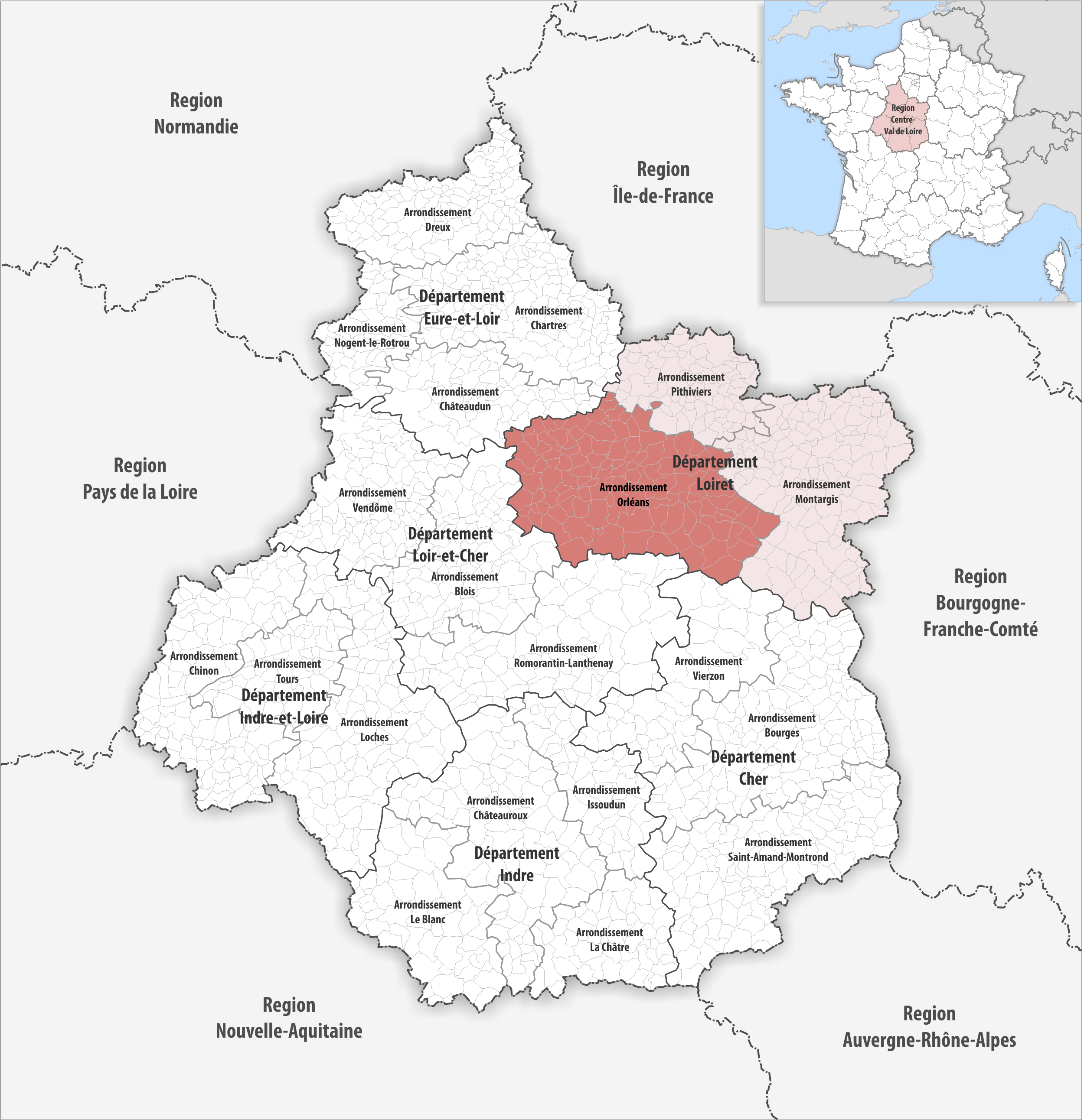 Lage des Arrondissements Orléans